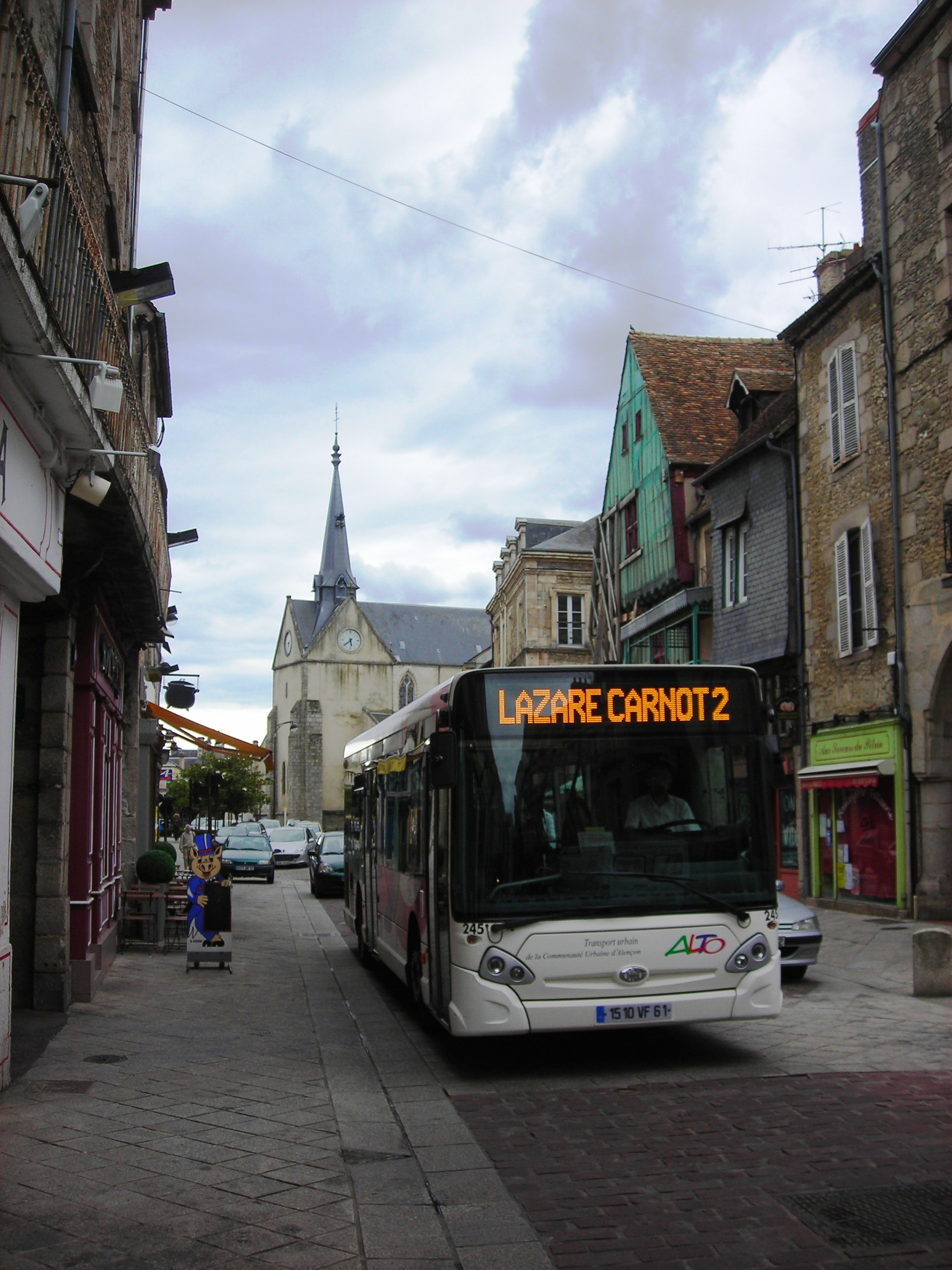 Autobus Heuliez GX sur la lingne 2 du reseau Alto de la ville Alençon (Orne,France)